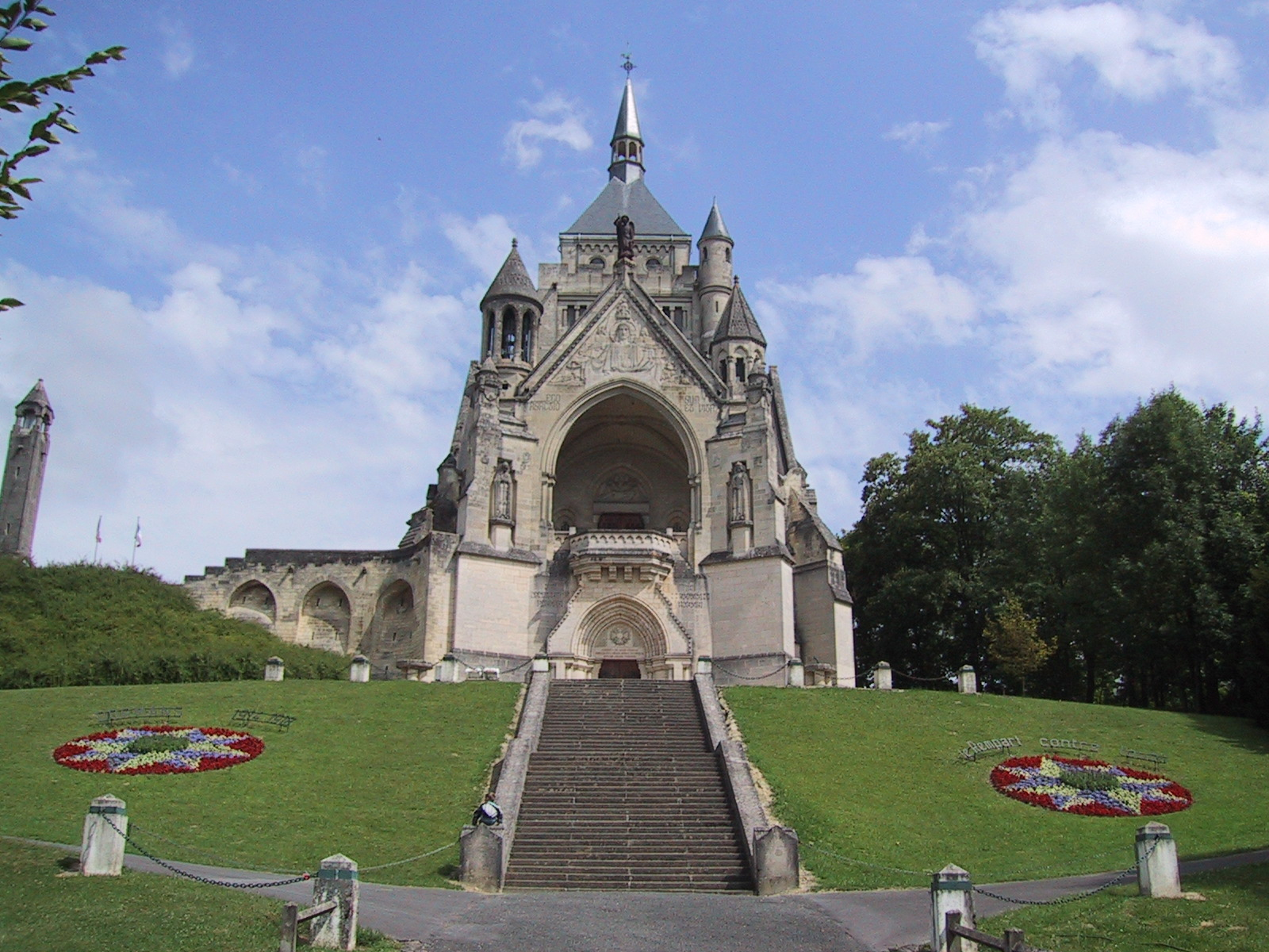 Chapelle de Dormans, mémorial des batailles de la Marne, avec la lanterne des morts sur la gauche.